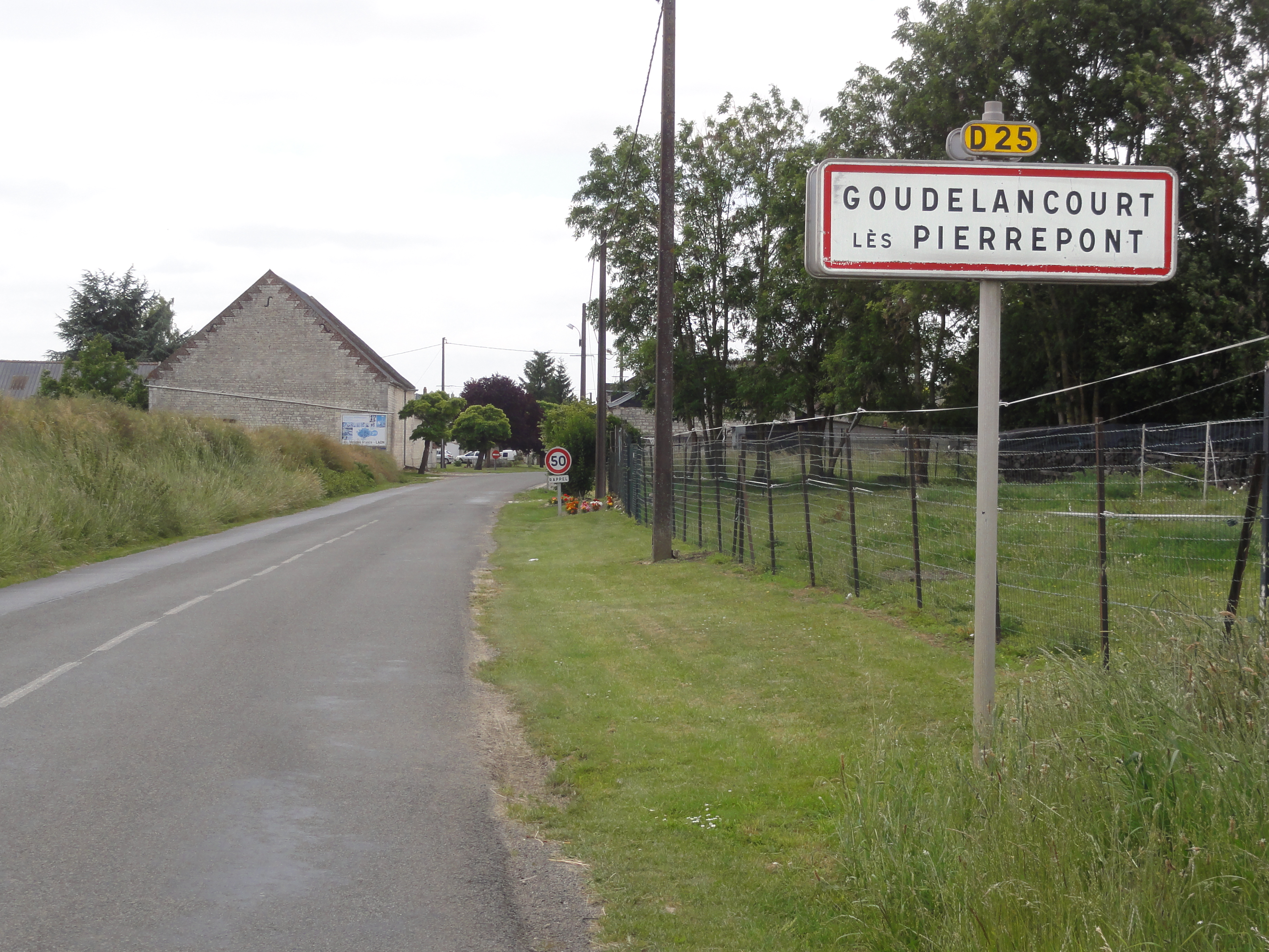 Goudelancourt-lès-Pierrepont (Aisne) city limit sign